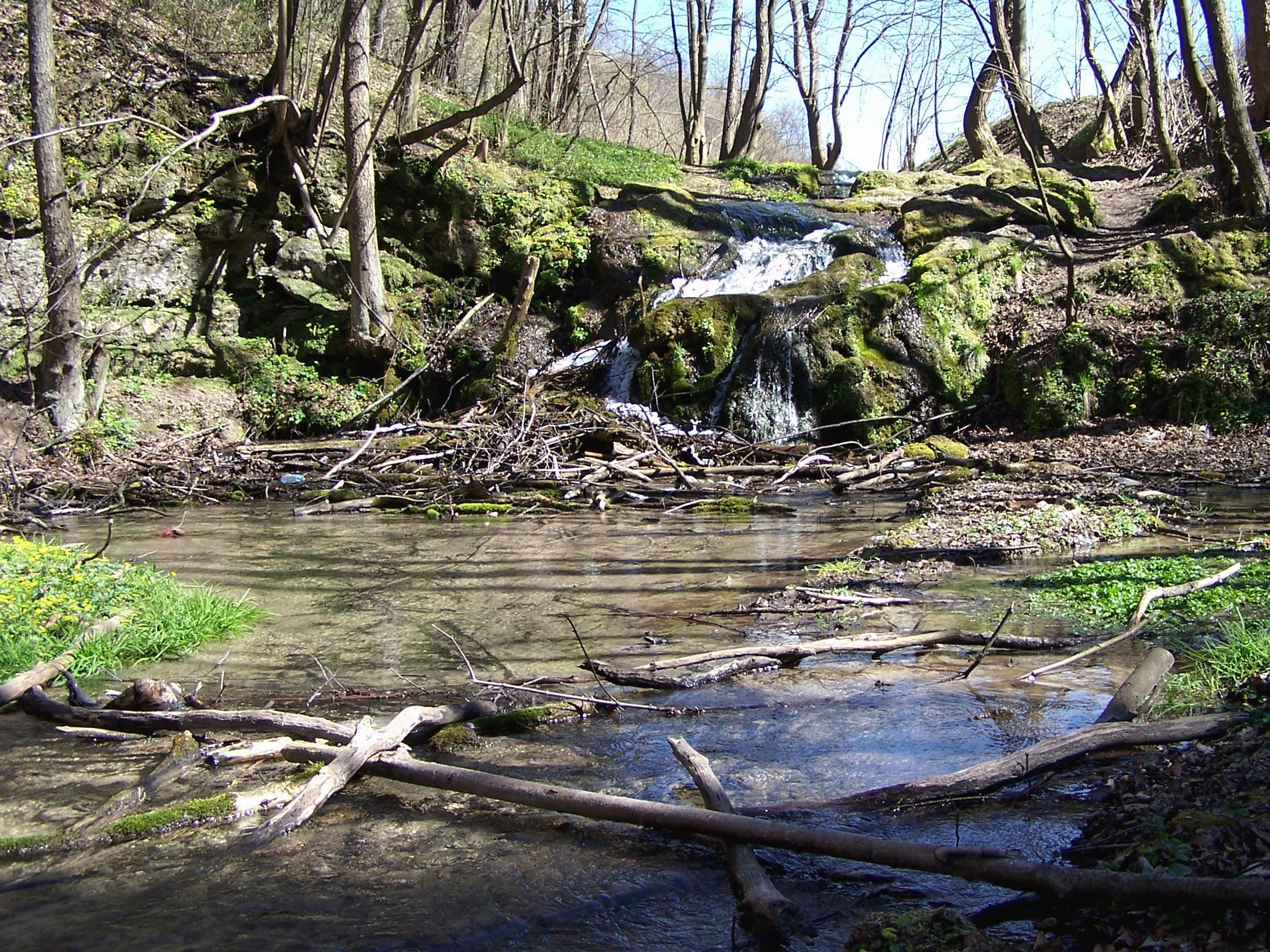 Dolina Będkowska (Park Krajobrazowy Dolinki Krakowskie)